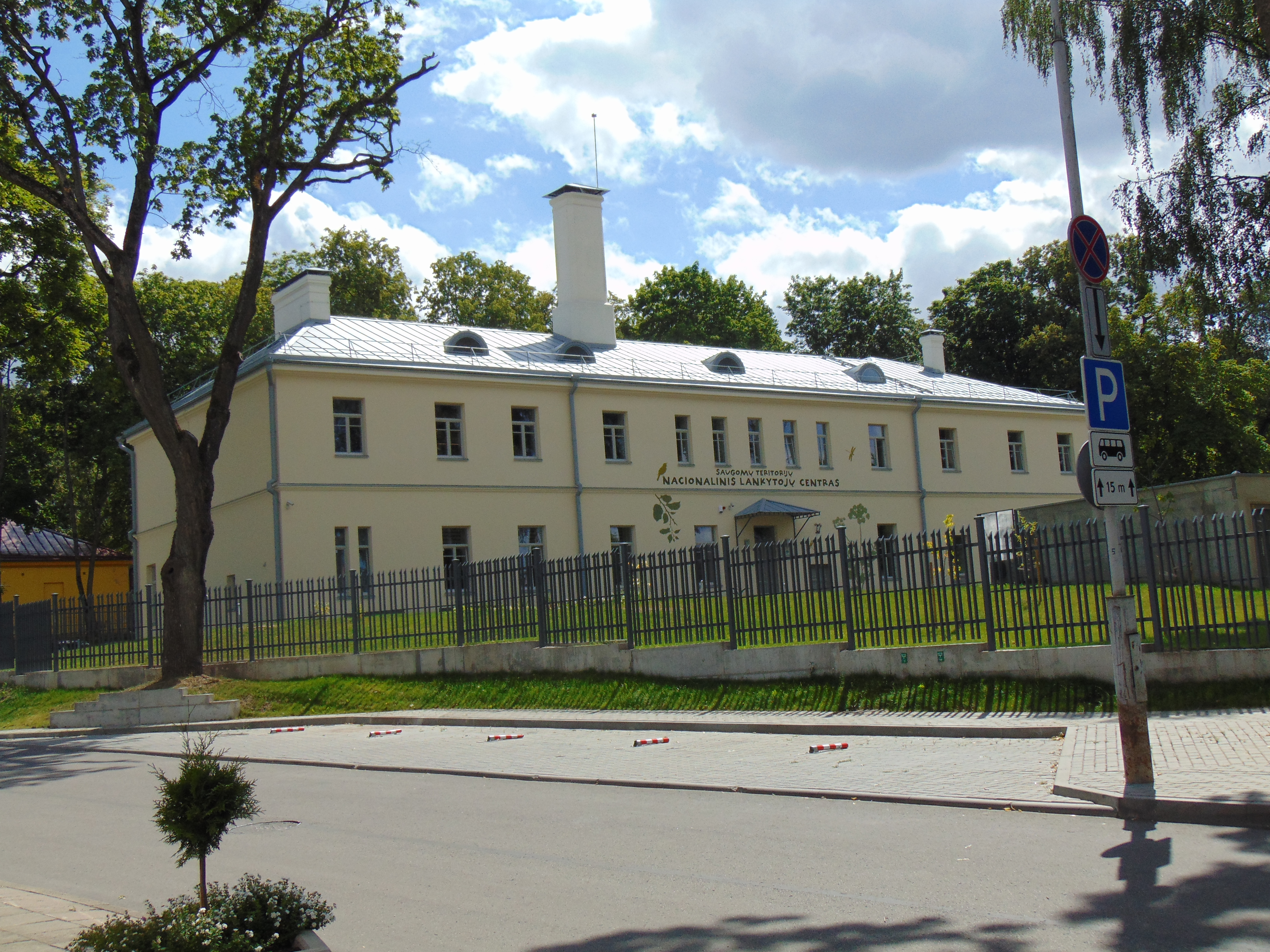 Valstybinė saugomų teritorijų tarnyba